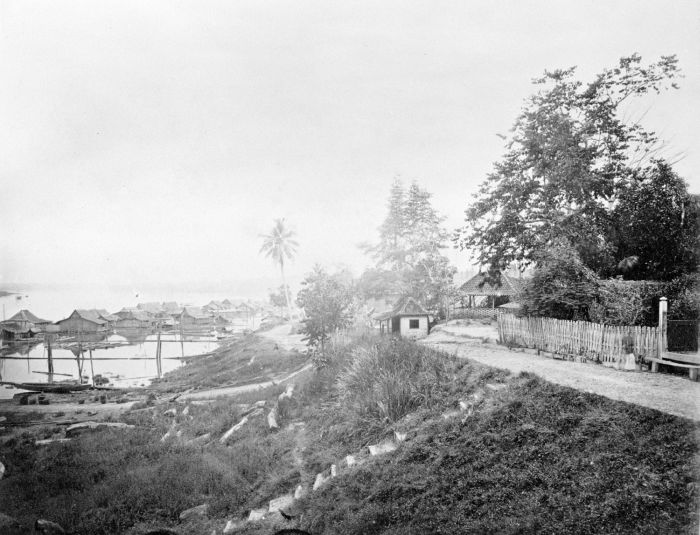 Foto. Deze foto is gemaakt tijdens de Sumatra Expeditie van 1877-1879. Landschappen en oudheden uit Djambi.. Batang Hari rivier bij Djambi, residentie Djambi, Sumatra